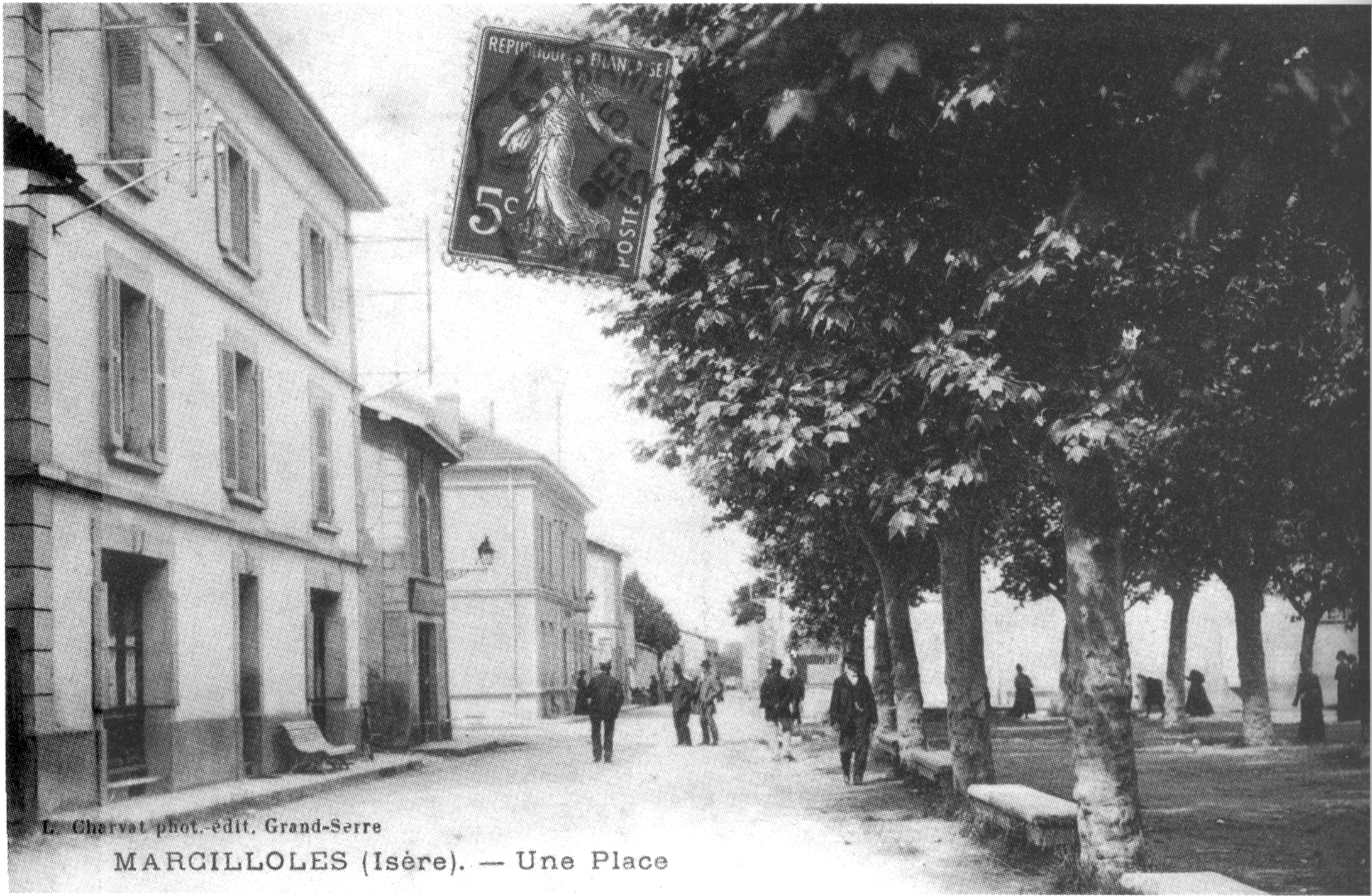 Marcilolles, une place en 1911